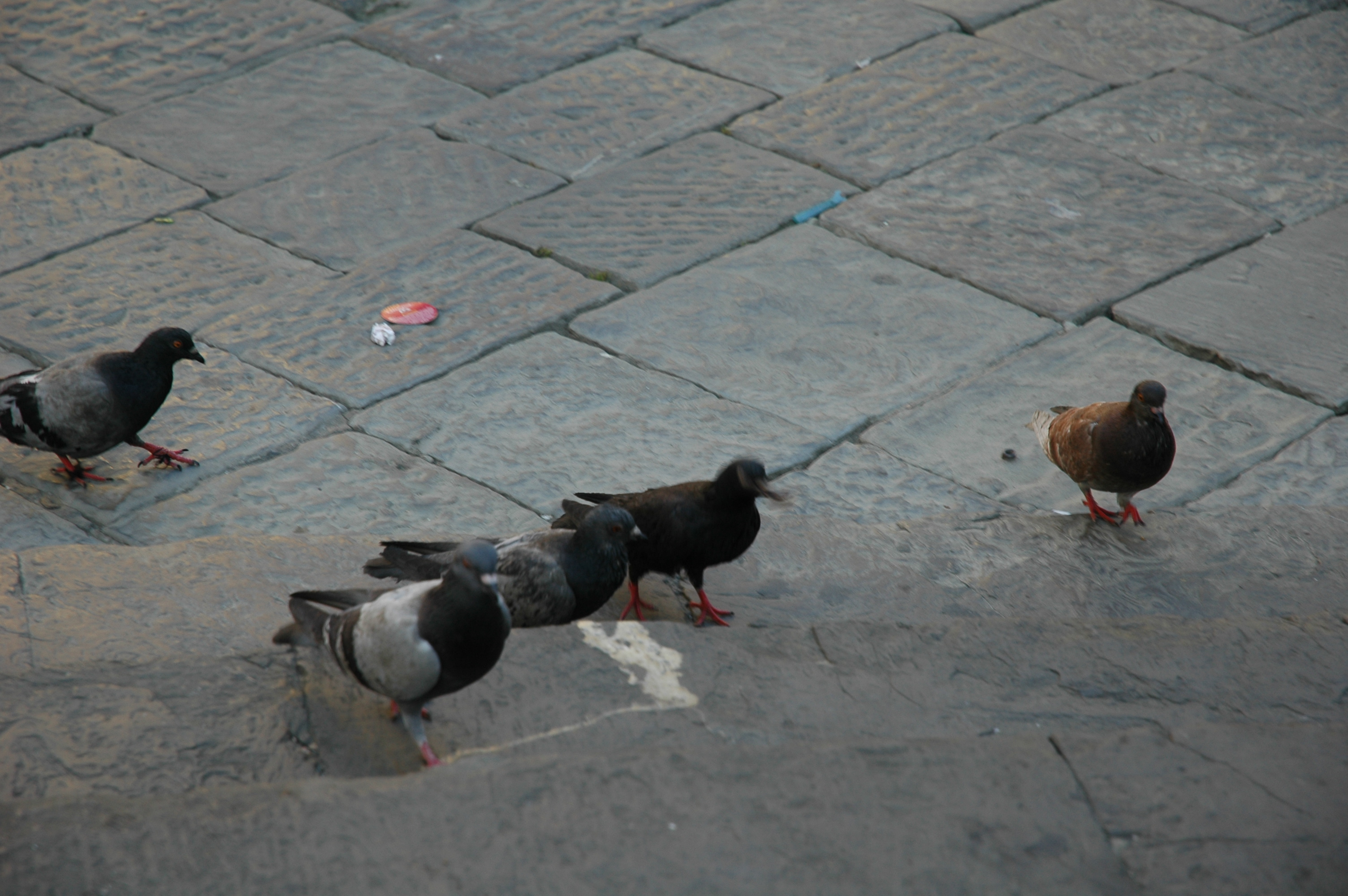 Resim, Hasan Sami Bolak tarafından Milano'da çekildi.